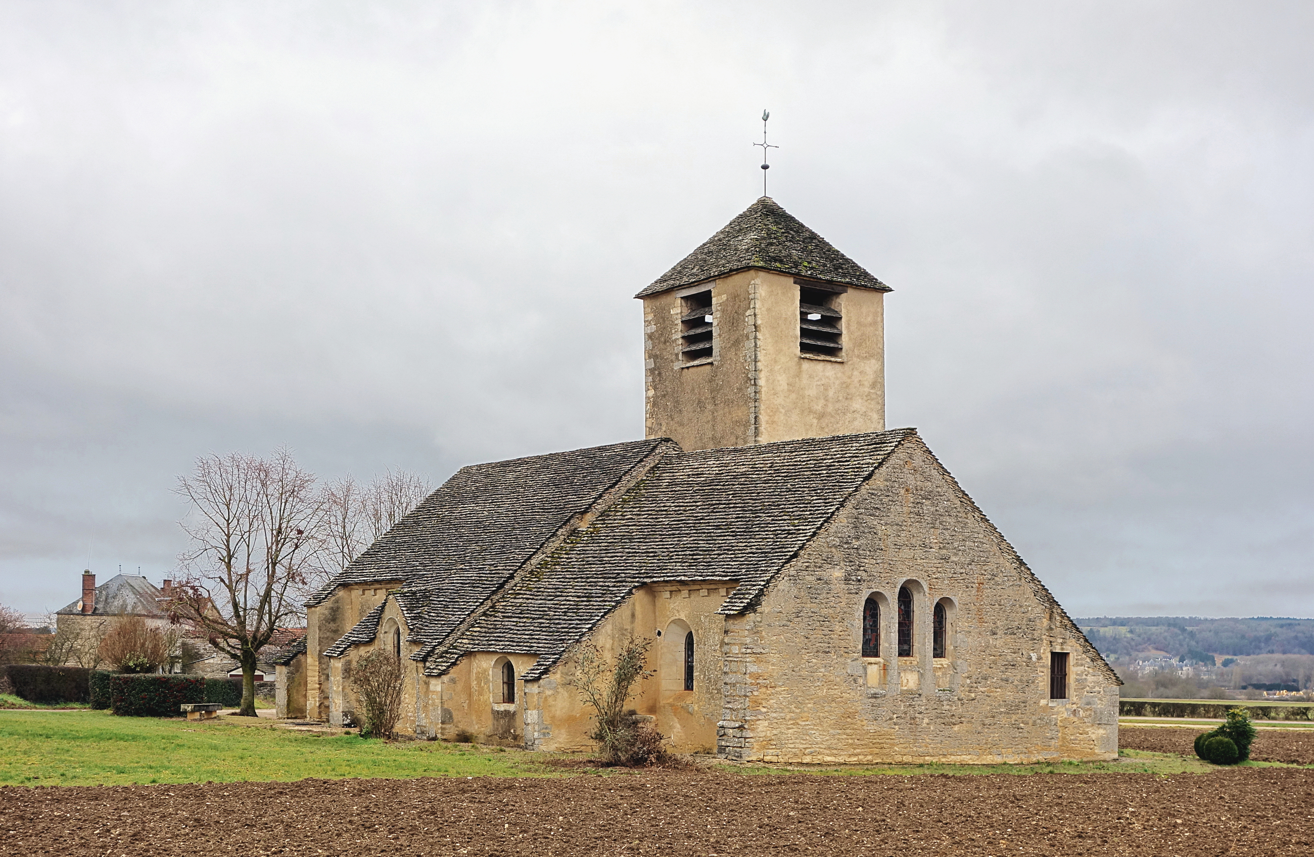 L'église Saint Jean Baptiste de Chassignelles.